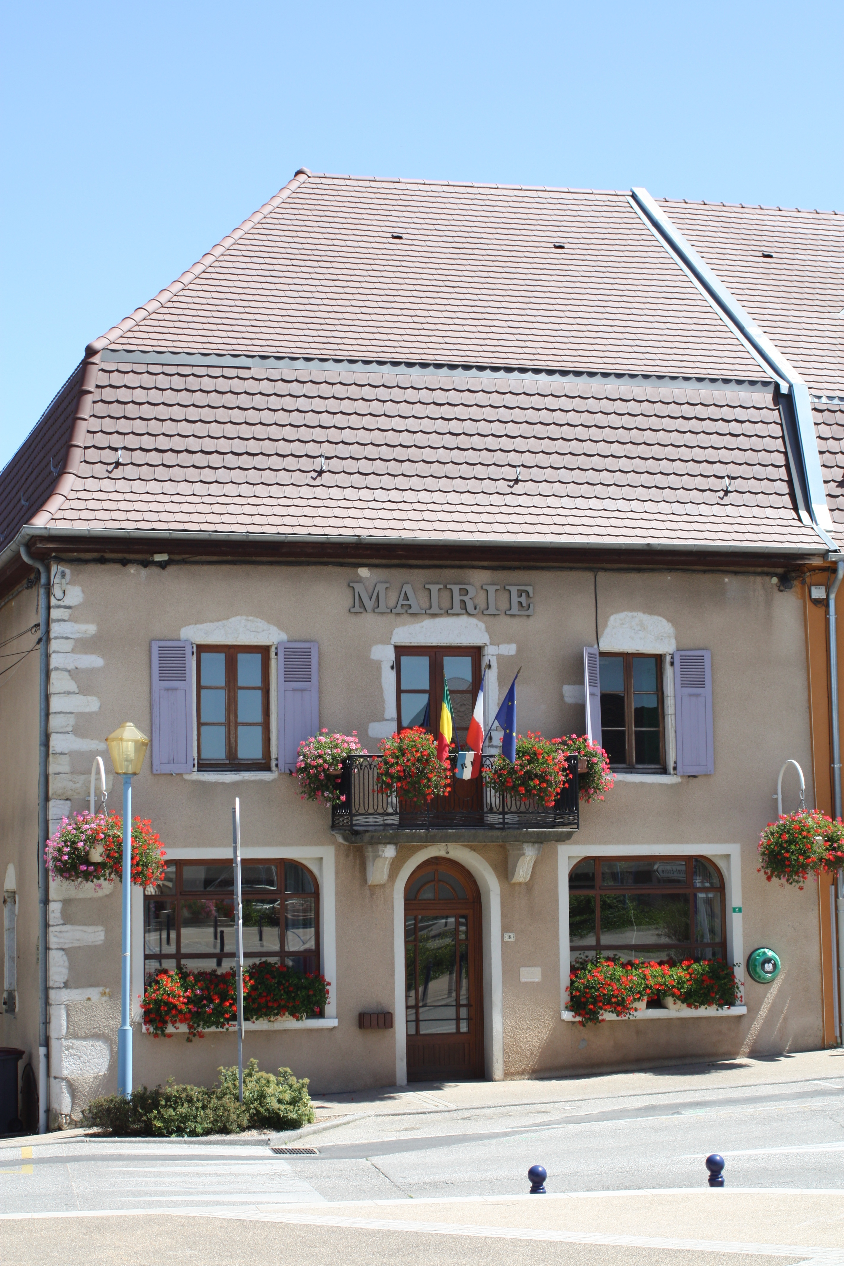 Maison au toit spécifique, cette bâtisse accueille au rez de chaussé la salle des mariages